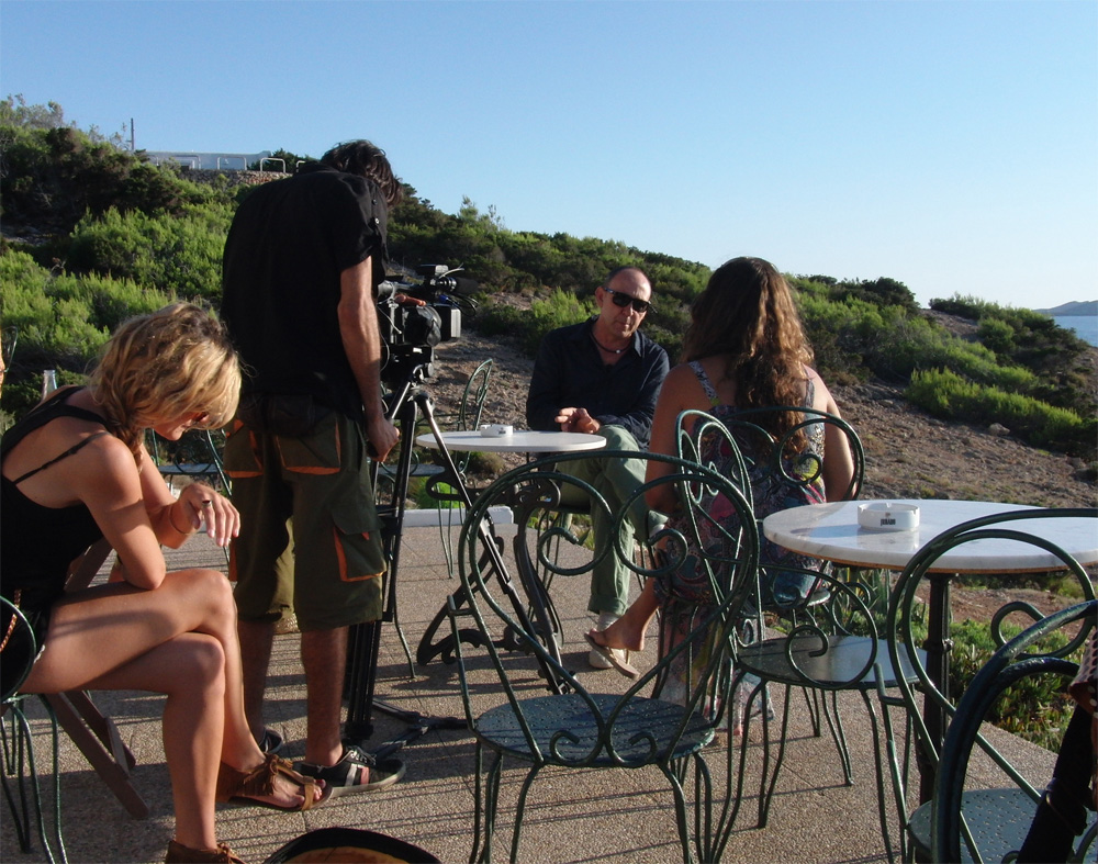 DJ-José Padilla im TV-Interview im Hostal La Torre, Ibiza;07.11